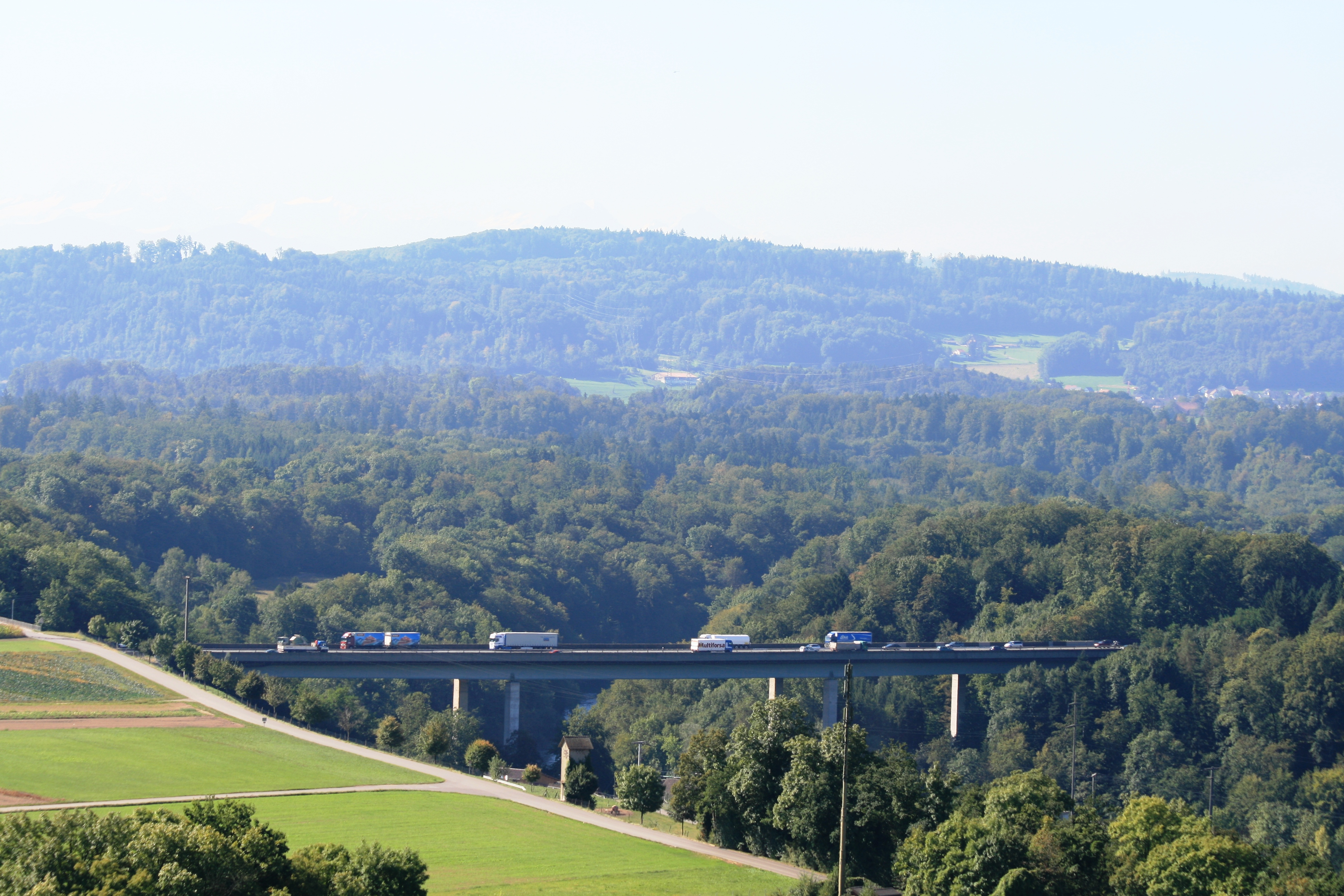 Brücke der A 1 über die Reuss zwischen Birrhard und Birmenstorf, Schweiz